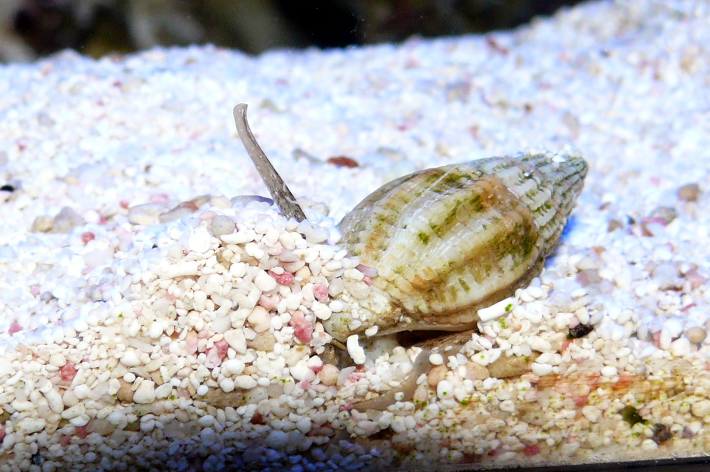 Nadelschnecke (Cerithium sp.) Nassarius sp.? Dysmorodrepanis (talk) 16:20, 3 July 2012 (UTC)